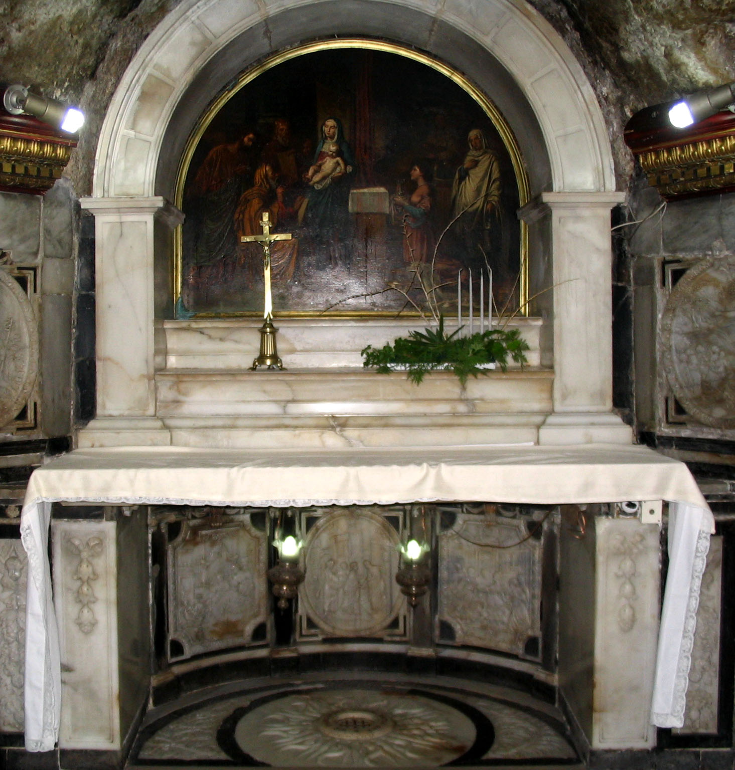 Ein Kerem, St John ba Harim